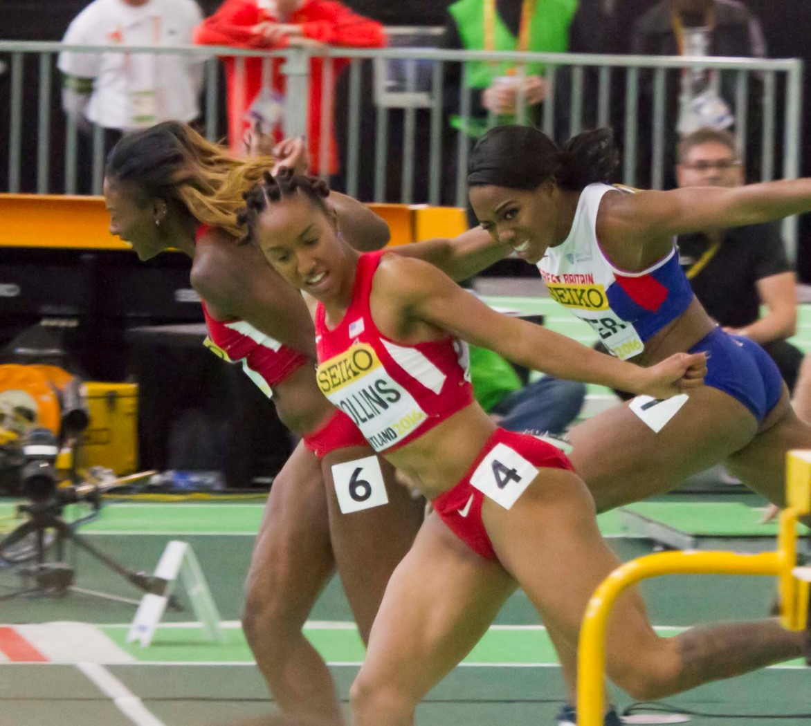 287 finale 60mH